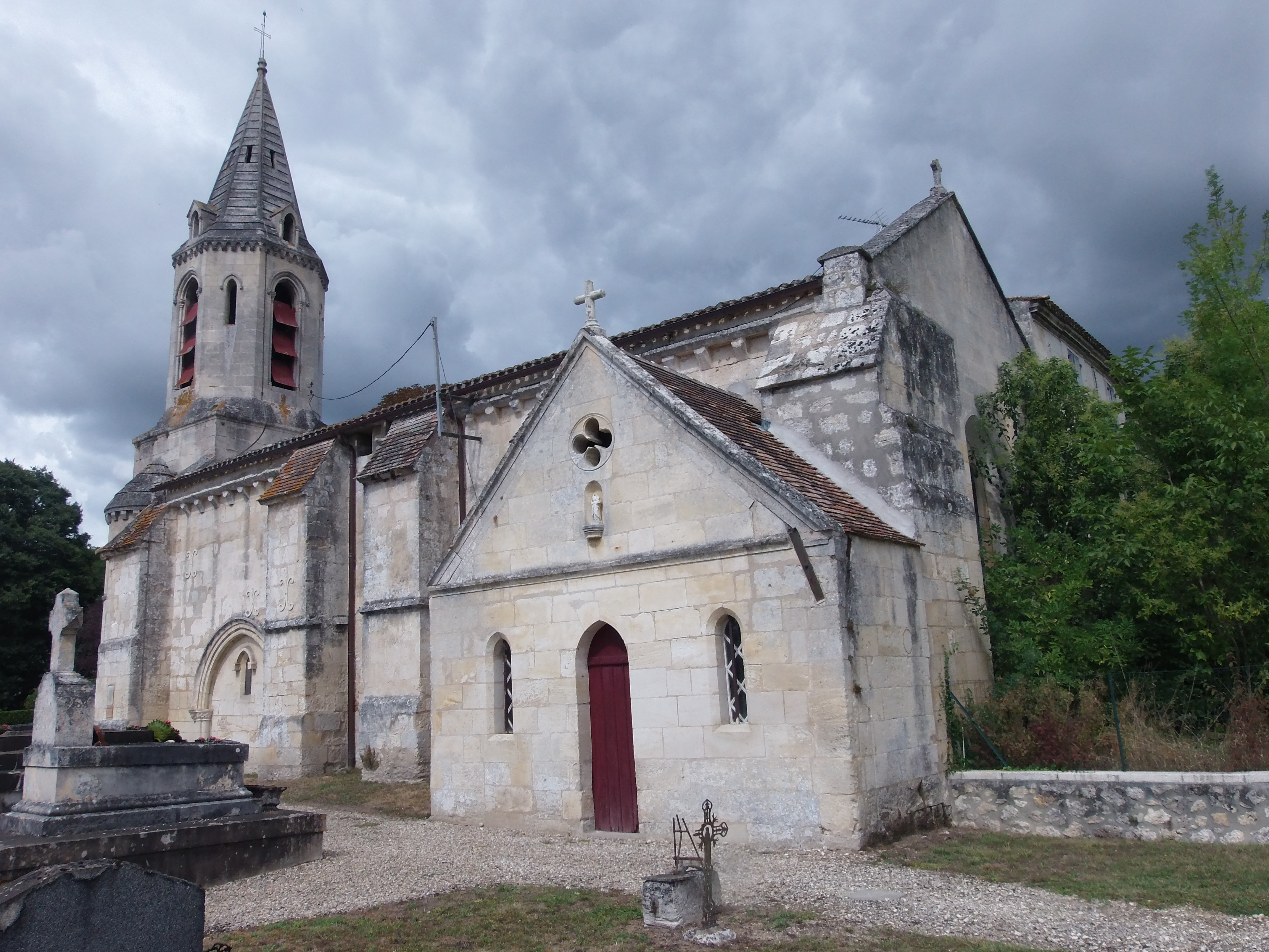 Église de Saint-Germain-de-la-Rivière (Gironde, France).